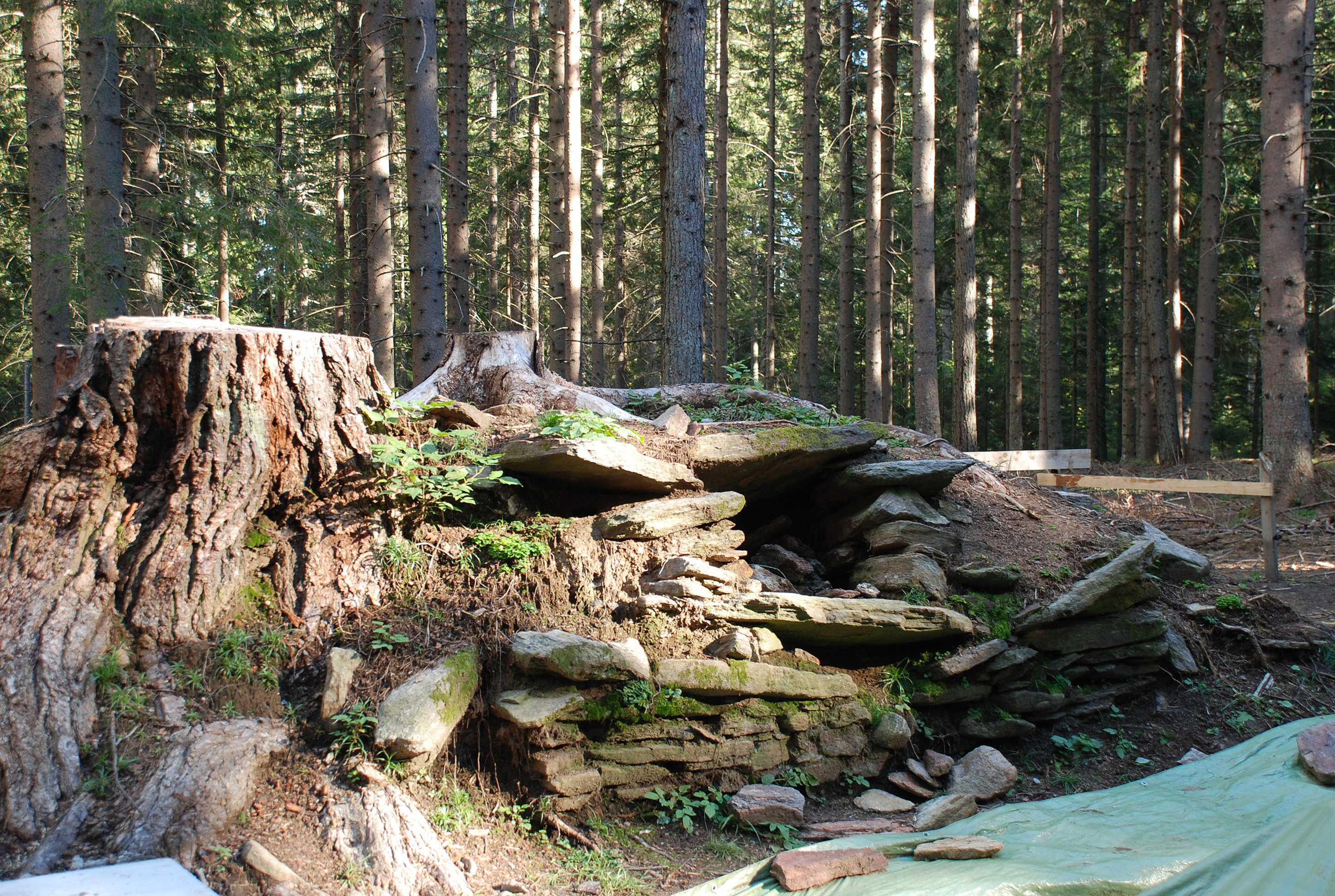 Klugbauer, Greisdorf, Steiermark, Österreich: archäologische Ausgrabung 2011, Gelände der Glashütte aus dem 17. Jahrhundert